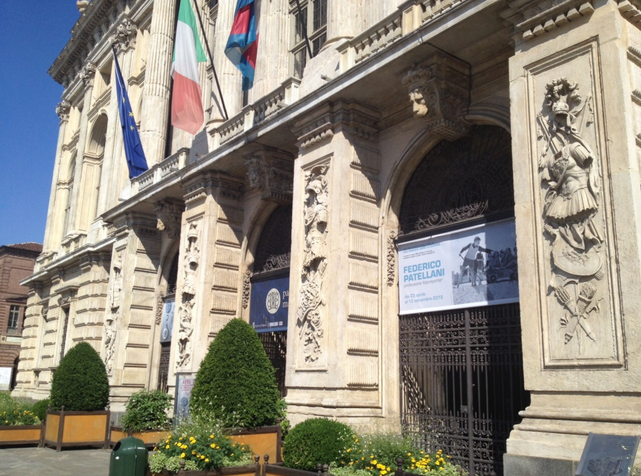 Striscione a Palazzo Madama di Torino per la mostra di Federico Patellani